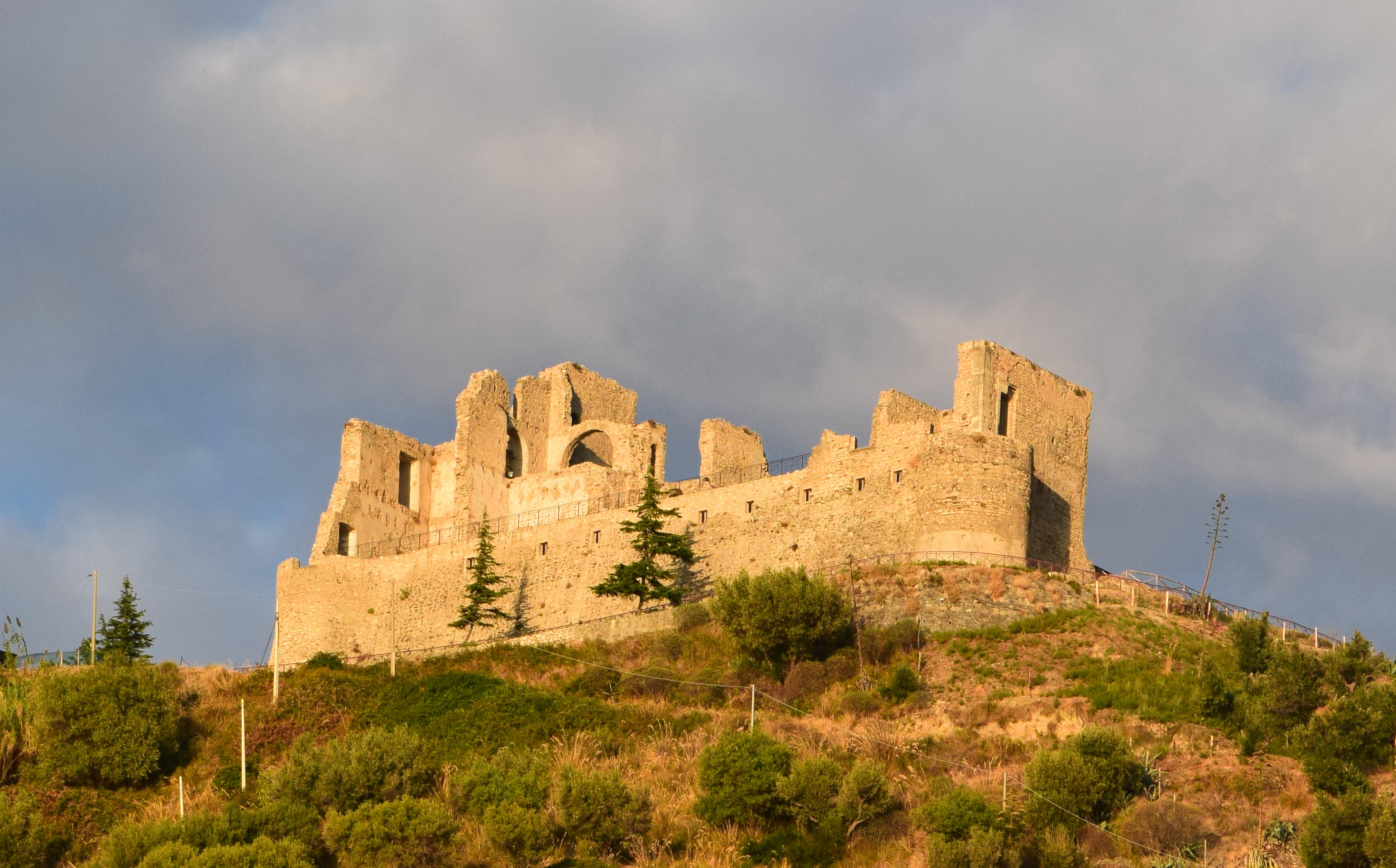 Castello della Valle This is a photo of a monument which is part of cultural heritage of Italy.